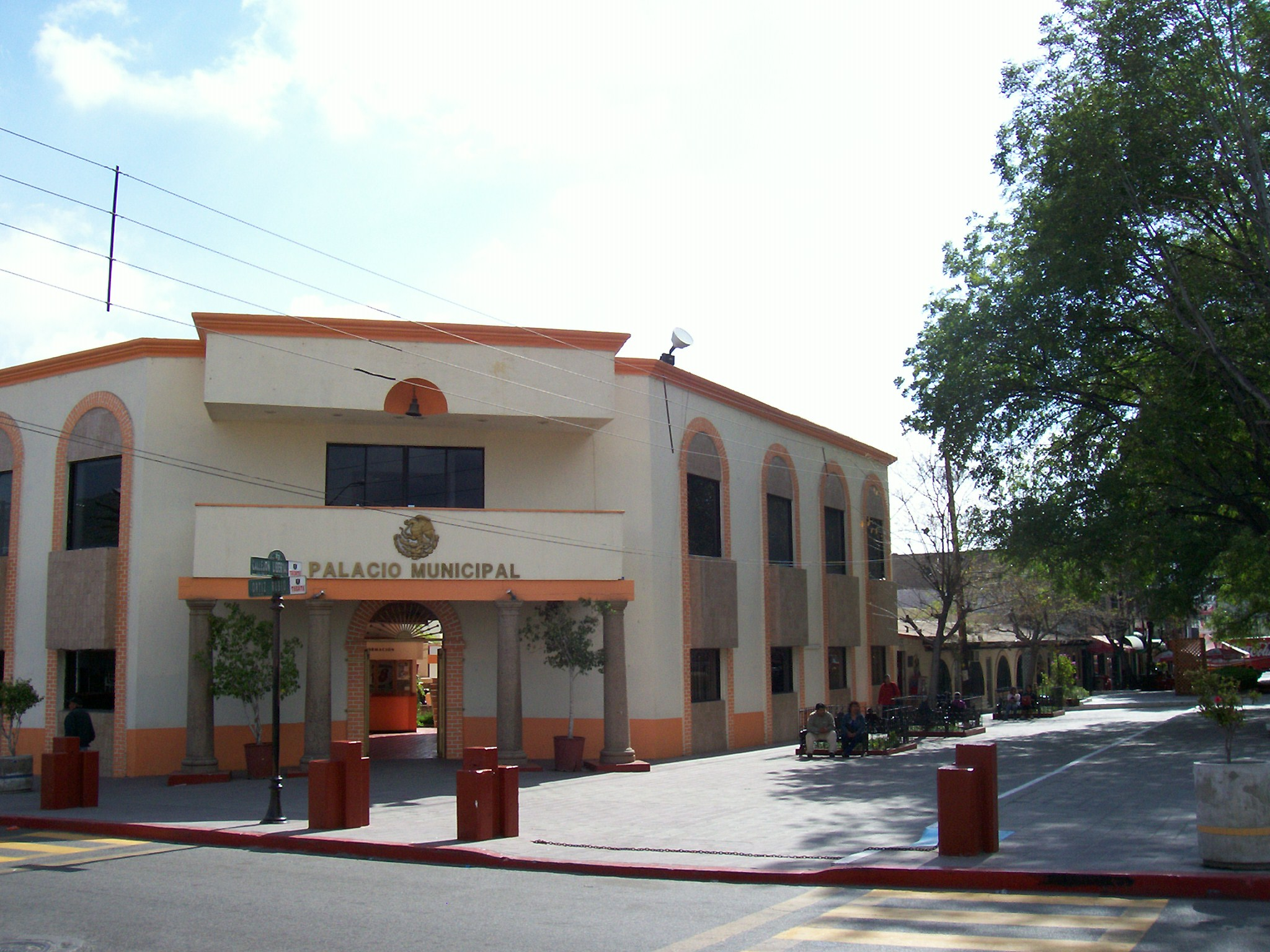 Palacio Municipal de Tecate, Mexico